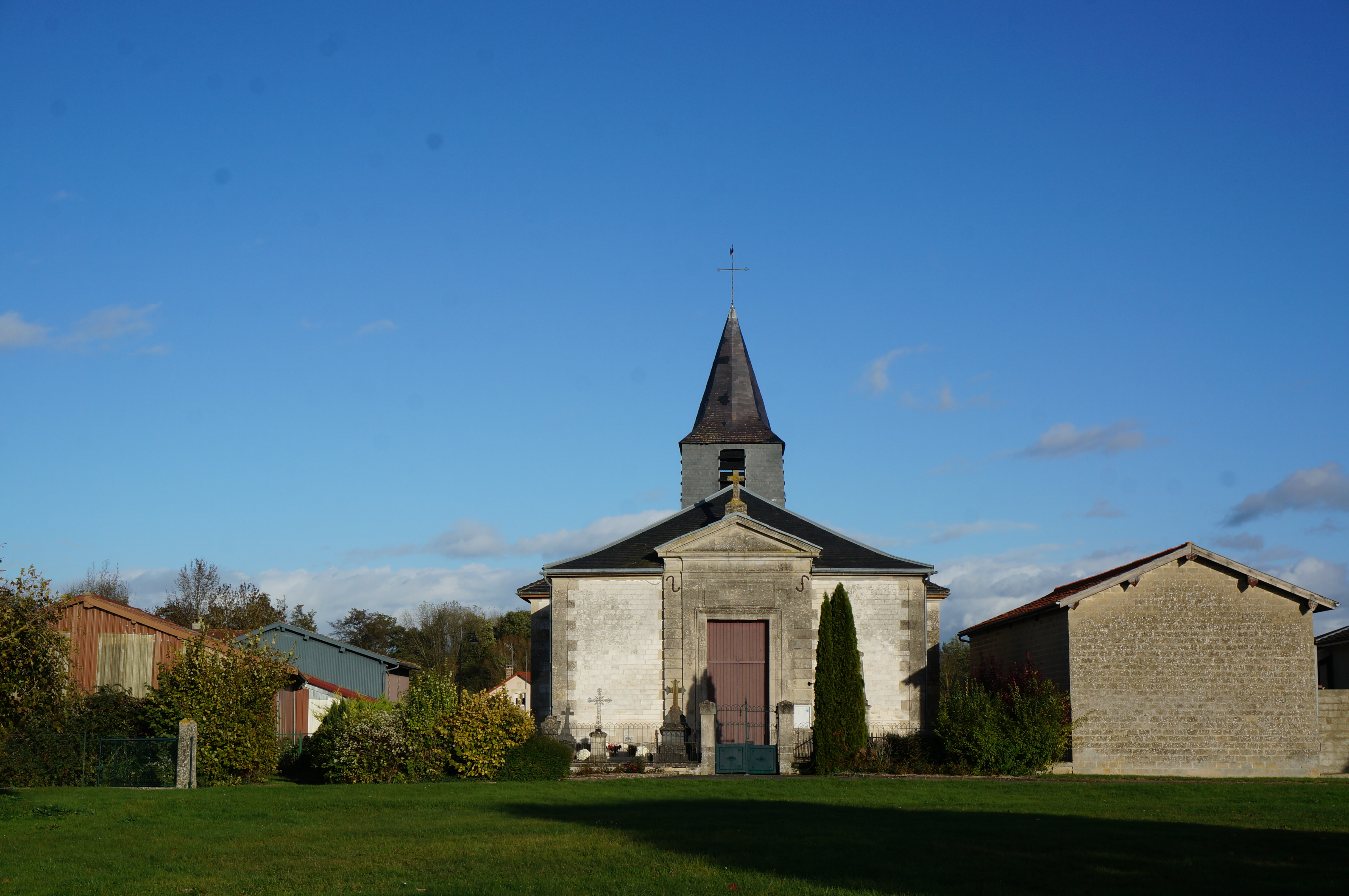 Dans la village.